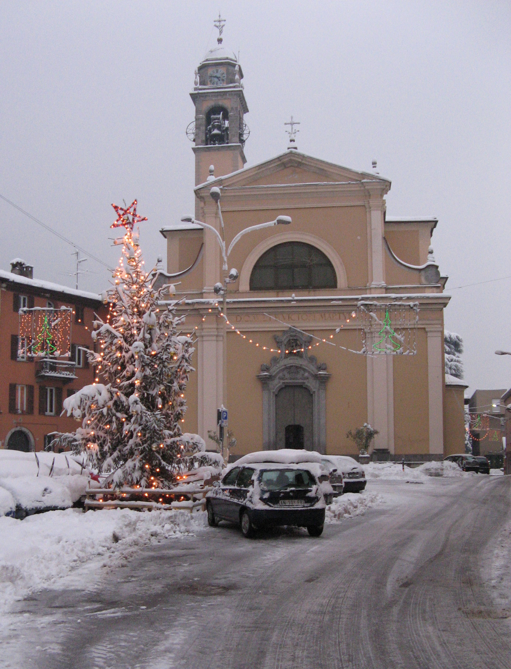 Albavilla: vista invernale della chiesa parrocchiale di San Vittore Martire.